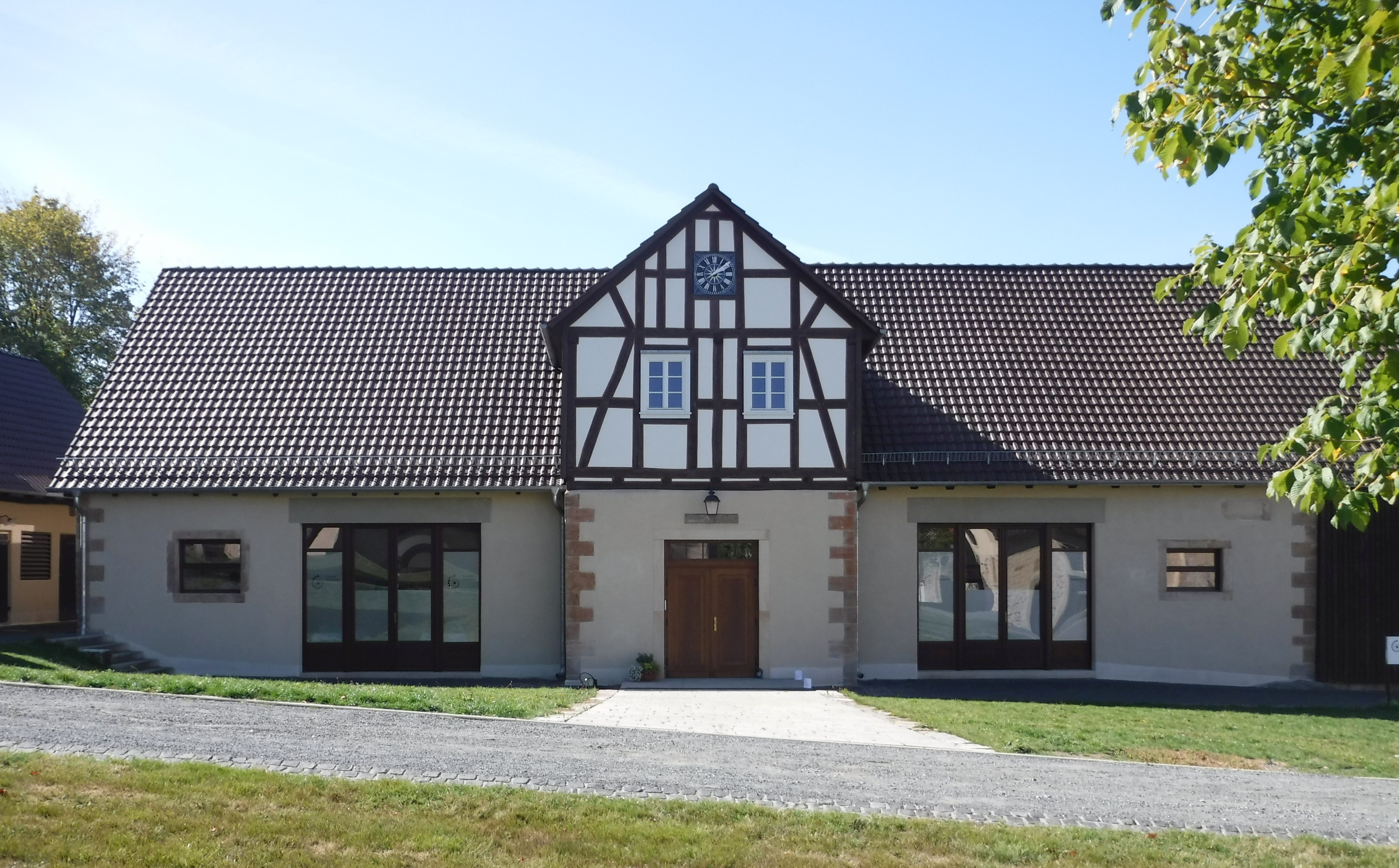 Schloss und Gut Großropperhausen, das größte Barockgut Hessens